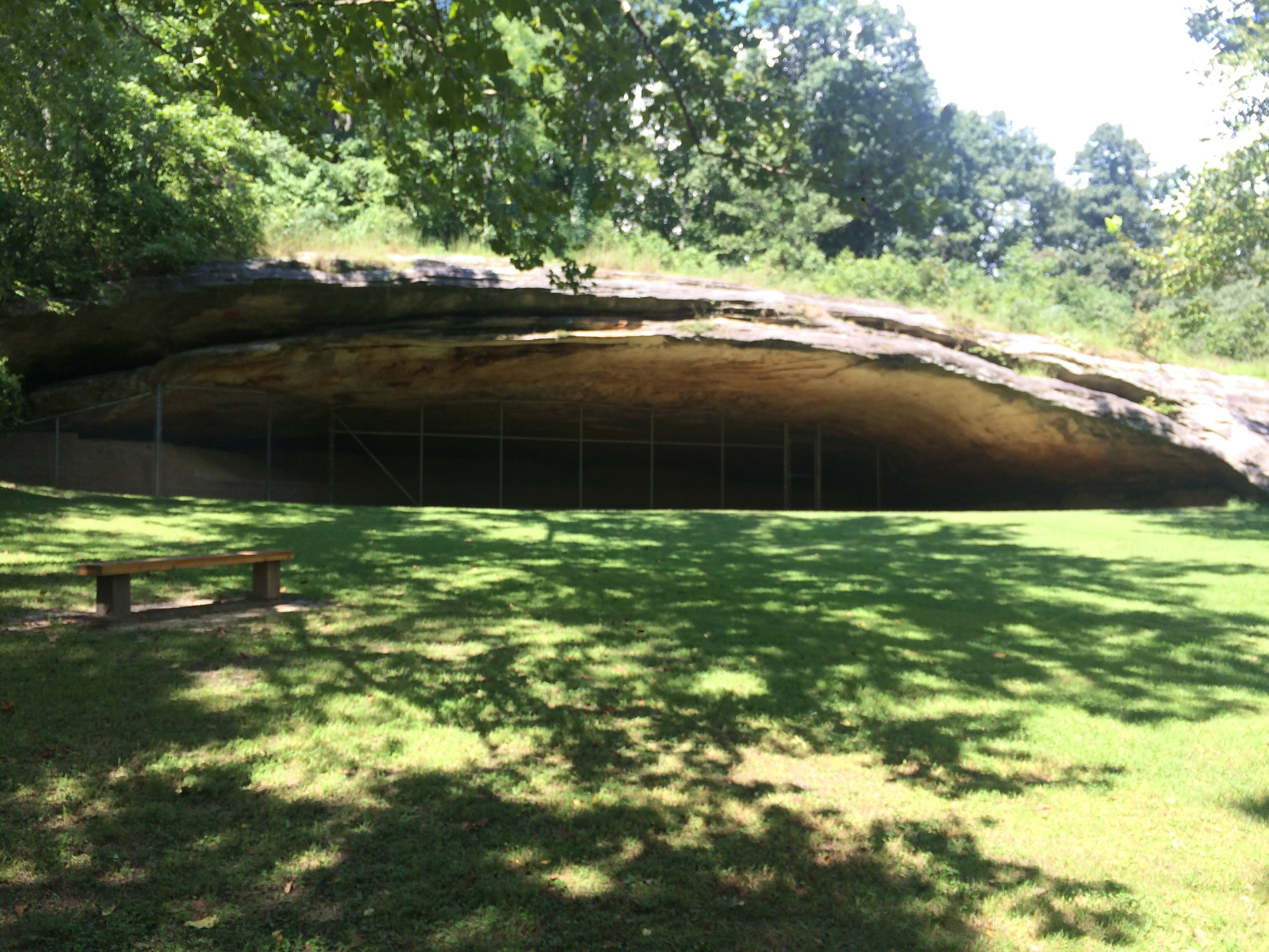 graham cave